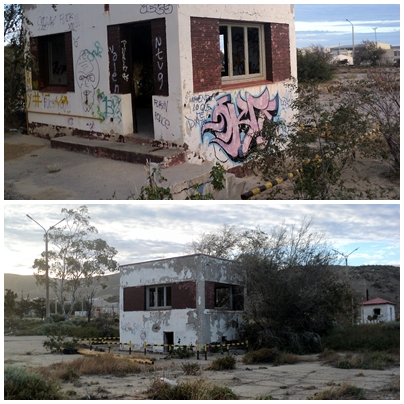 Restos supervivientes de una terminal en el interior del predio con una vía al costado y con su anden aun intacto.